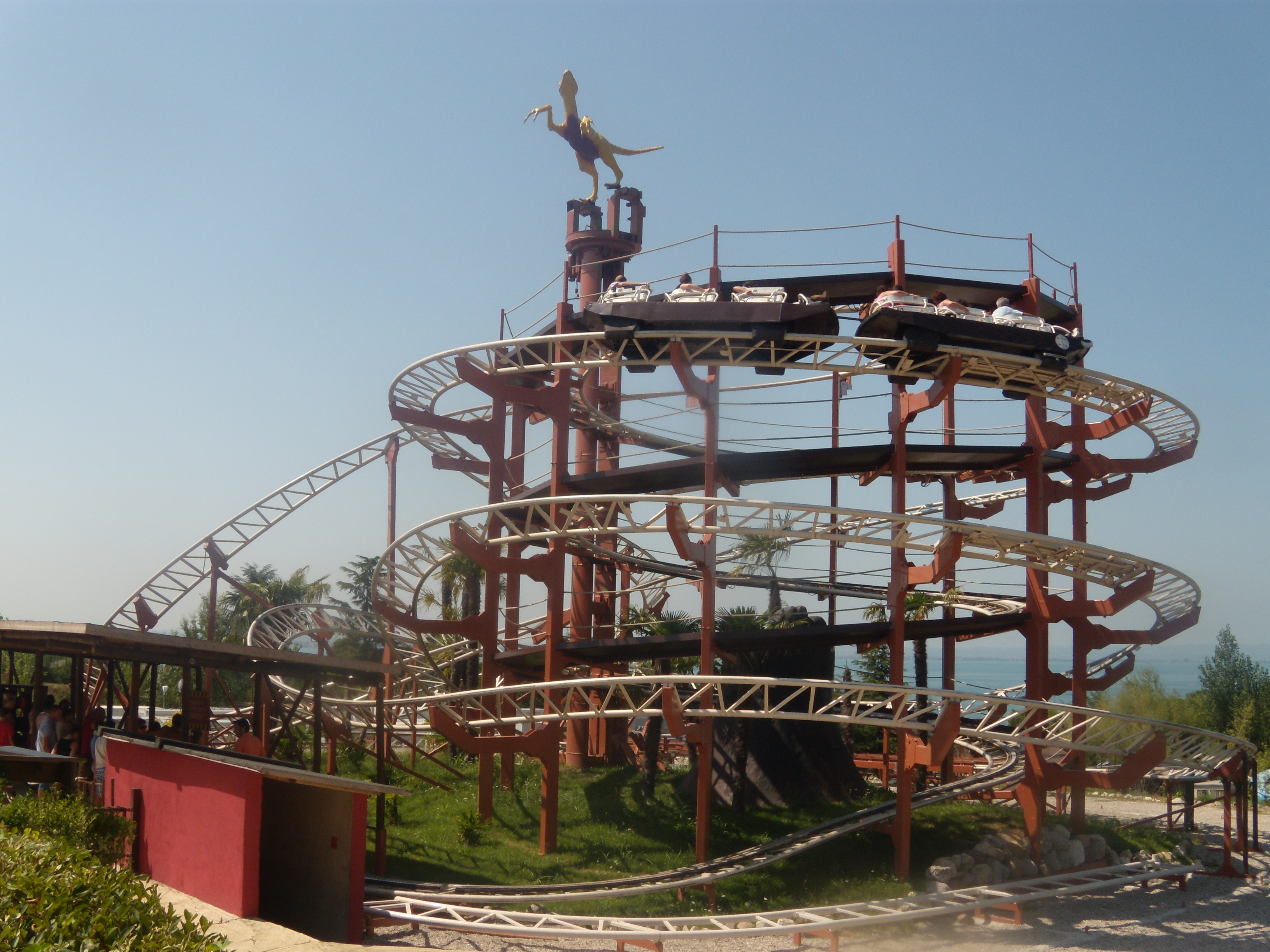 Montagnes russes BrontoJet à Movieland Park, Italie.